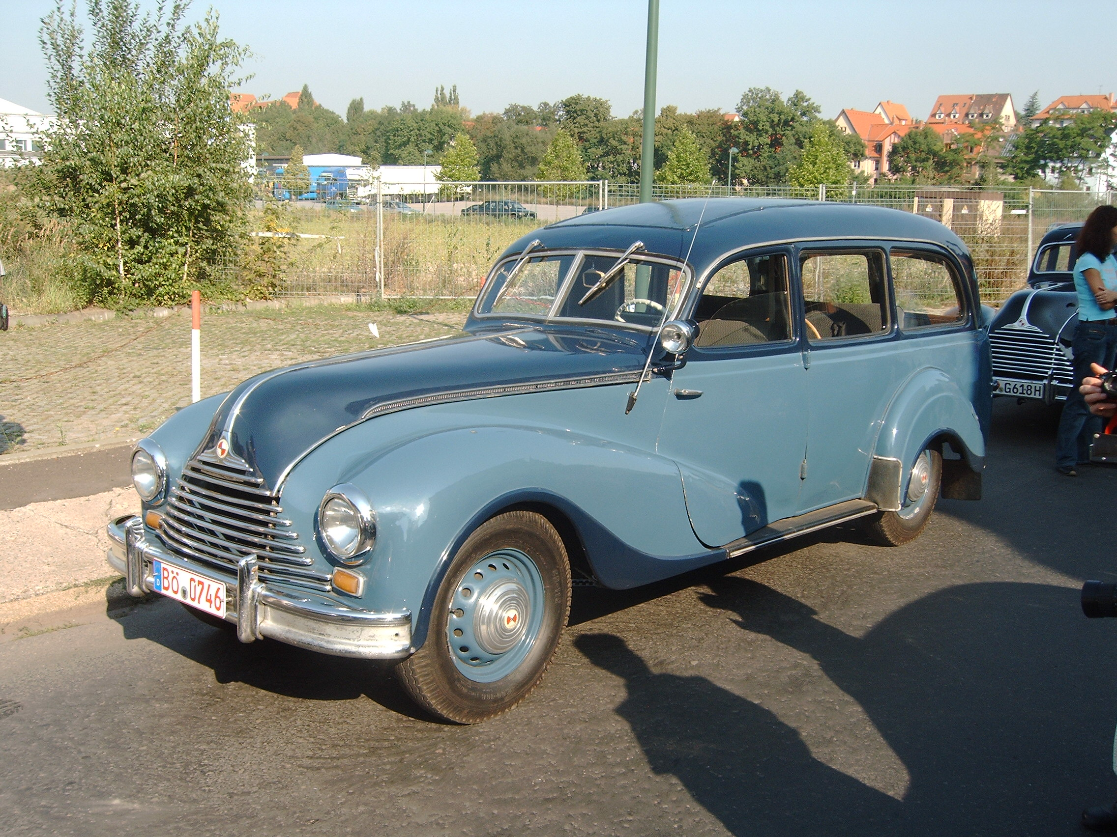 Eisenach, 04.09.2004 EMW-Kombi